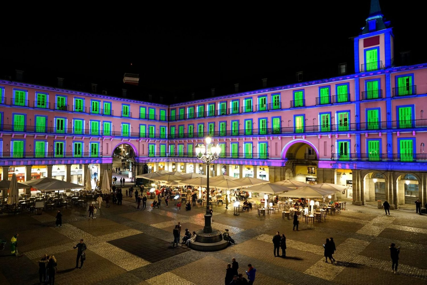 La Plaza Mayor de Madrid tiene un largo recorrido, 400 años, y una larga historia. Una trayectoria para ver y oír en dieciocho minutos gracias a la tecnología: un video mapping de 360º inmersivo, un viaje visual y sonoro que recorre desde su nacimiento hasta nuestros días y que se proyectará esta tarde, y las del sábado y domingo, a las 20:30 horas, sobre las cuatro fachadas de este emblemático lugar.